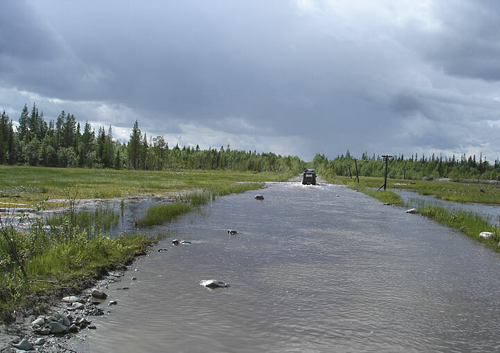 Магистраль 509